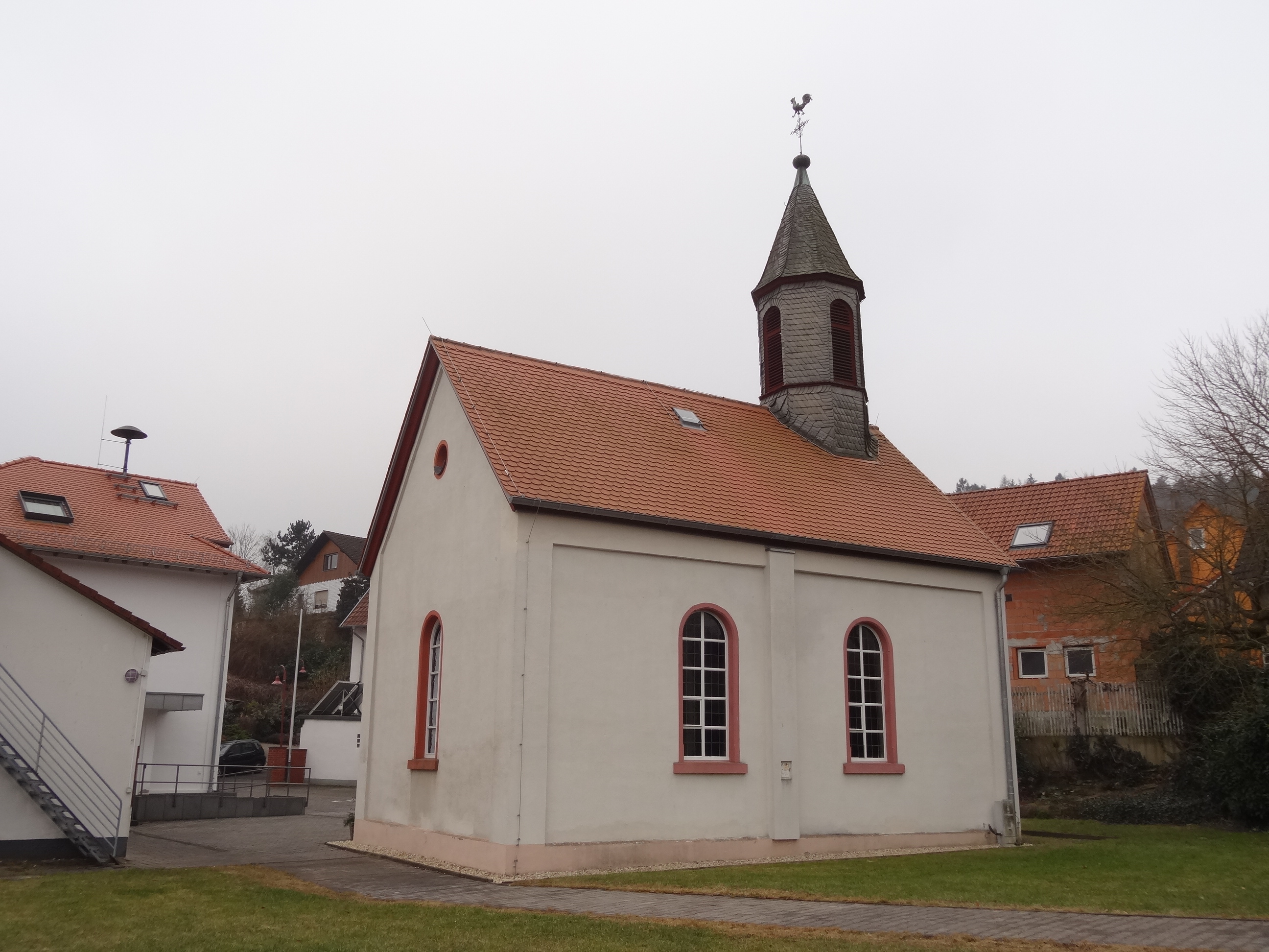 Evangelische Kirche (Hausen-Oes)